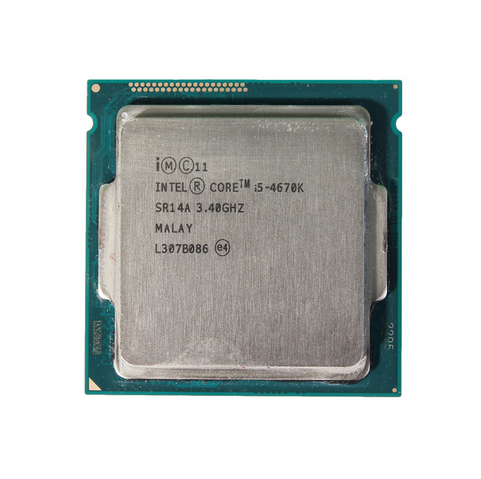 Intel Core i5 4670K Haswell